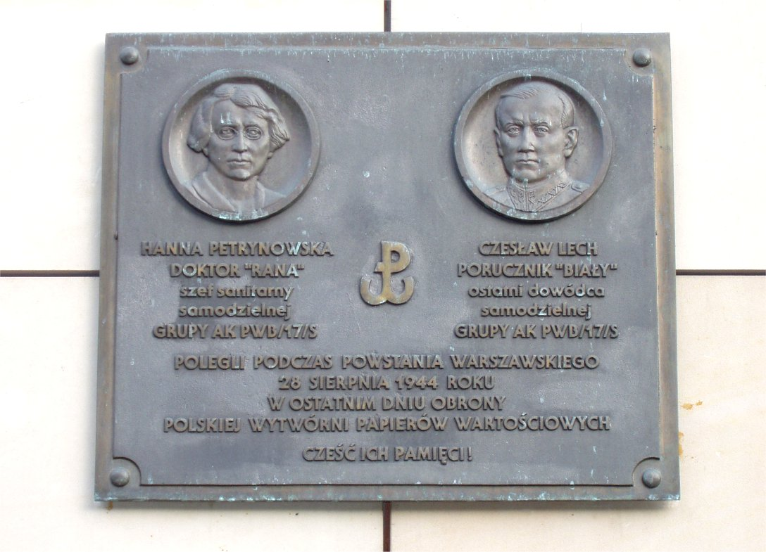 Przy gmachu PWPW (Zakroczymska-Sanguszki) w Warszawie (fot Zu)